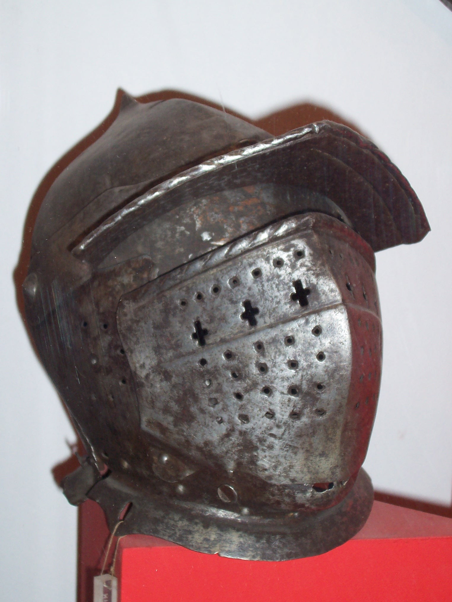 Burgonet